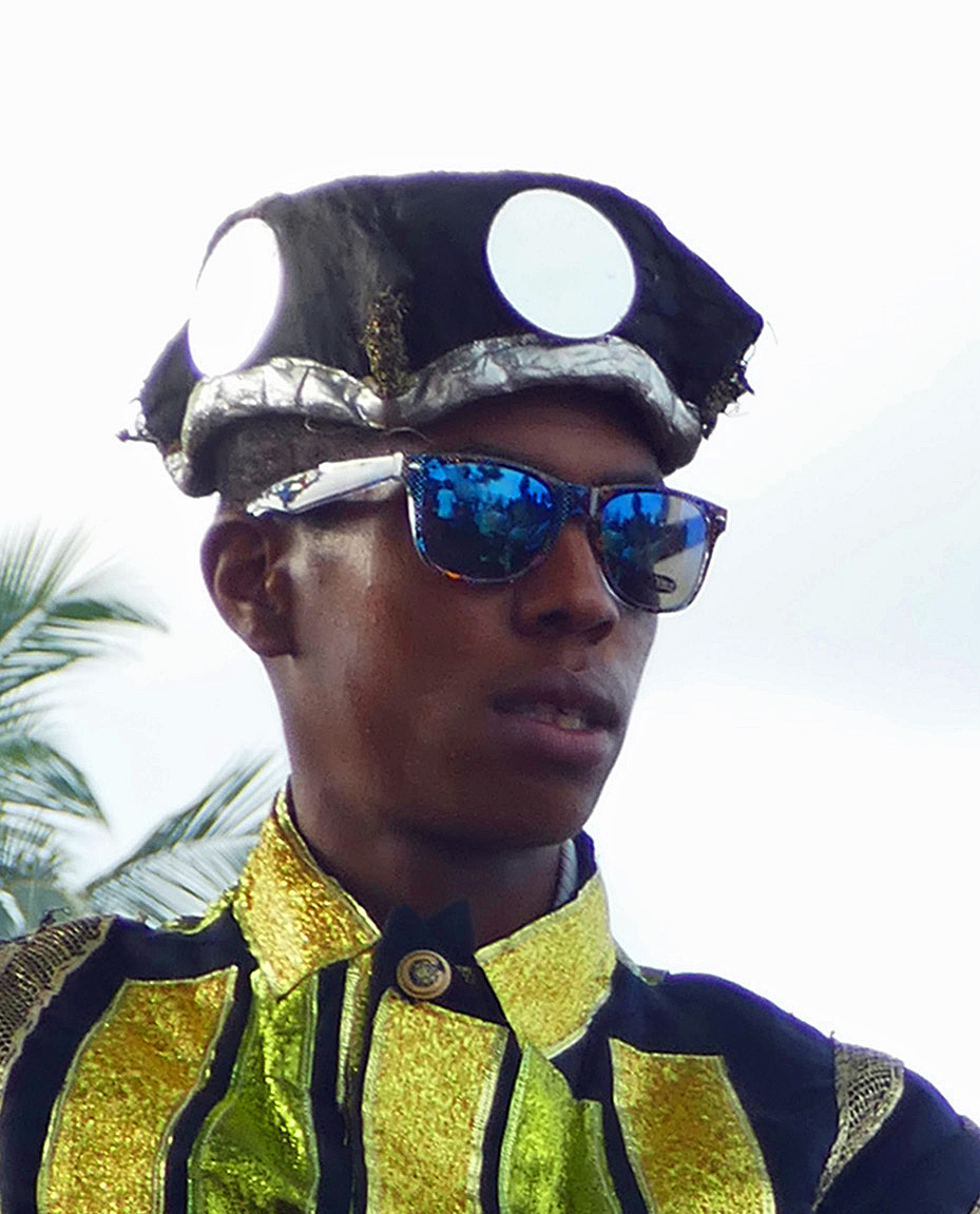 Personnage portant des lunettes de soleil lors d'un tchiloli représenté devant l'église São Pedrão de São Tomé à l'occasion de la fête patronale. Le tchiloli est une forme théâtrale, musicale et dansée créée au XVIe siècle, jouée par des pêcheurs et des paysans. Traditionnellement elle met en scène la seule pièce du répertoire, La tragédie du marquis de Mantoue et de l'empereur Charlemagne.